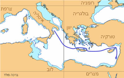 אוניית המעפילים ברכה פולד - מסלול